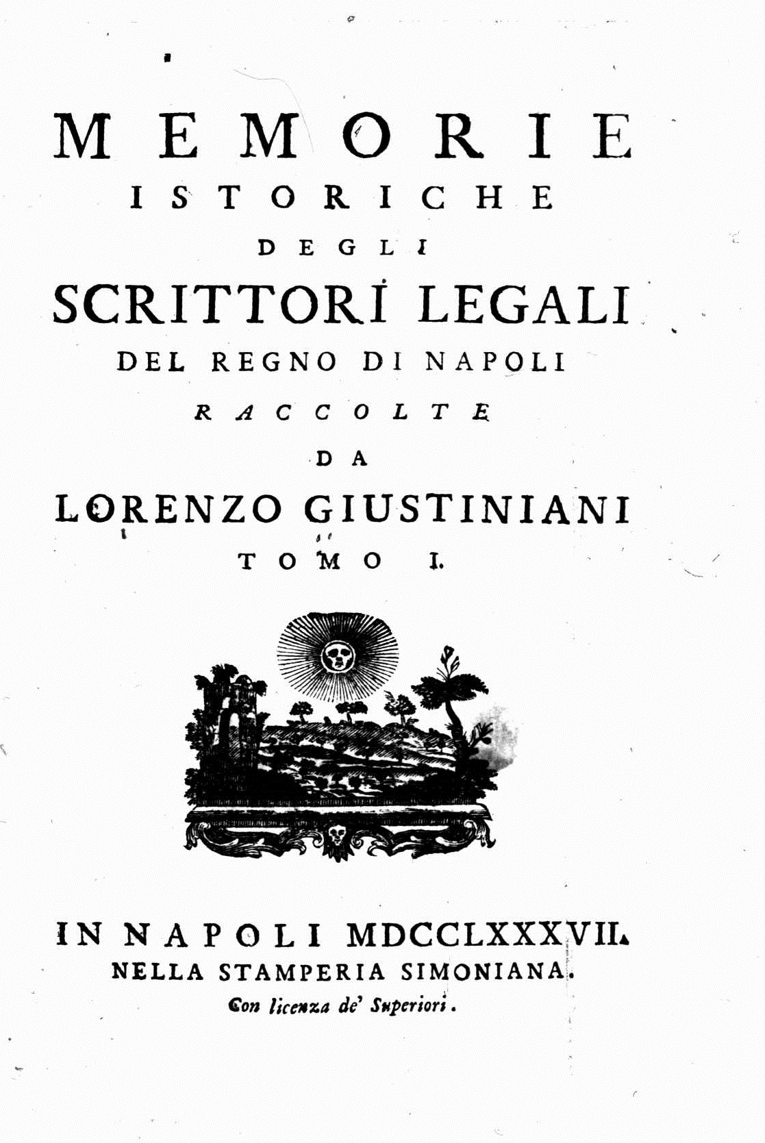 Frontespizio